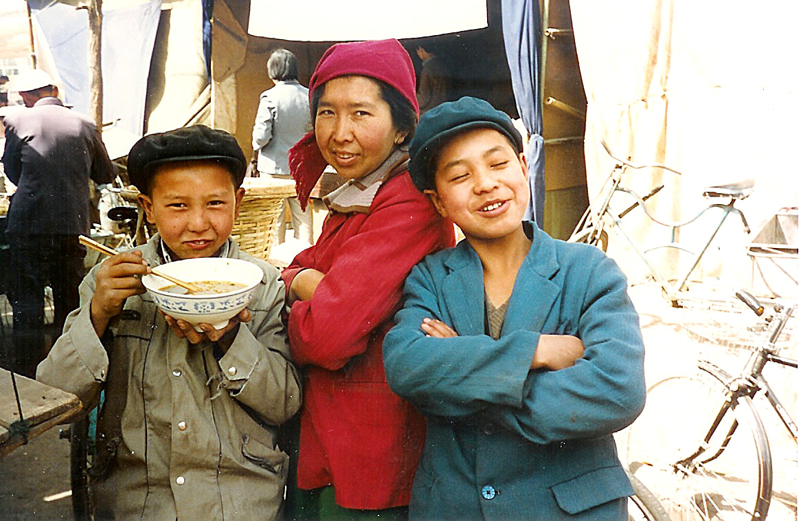 Kanner a China, frougemutt.